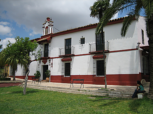 Estado actual de la fachada principal del cortijo (antigua alquería).